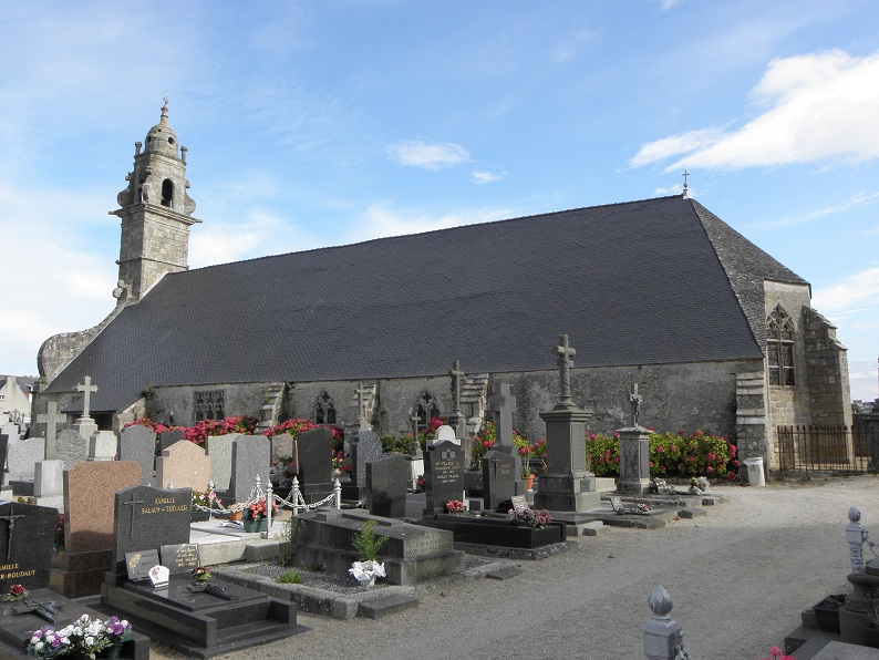 Église Saint-Pierre à Saint-Pol-de-Léon (29).